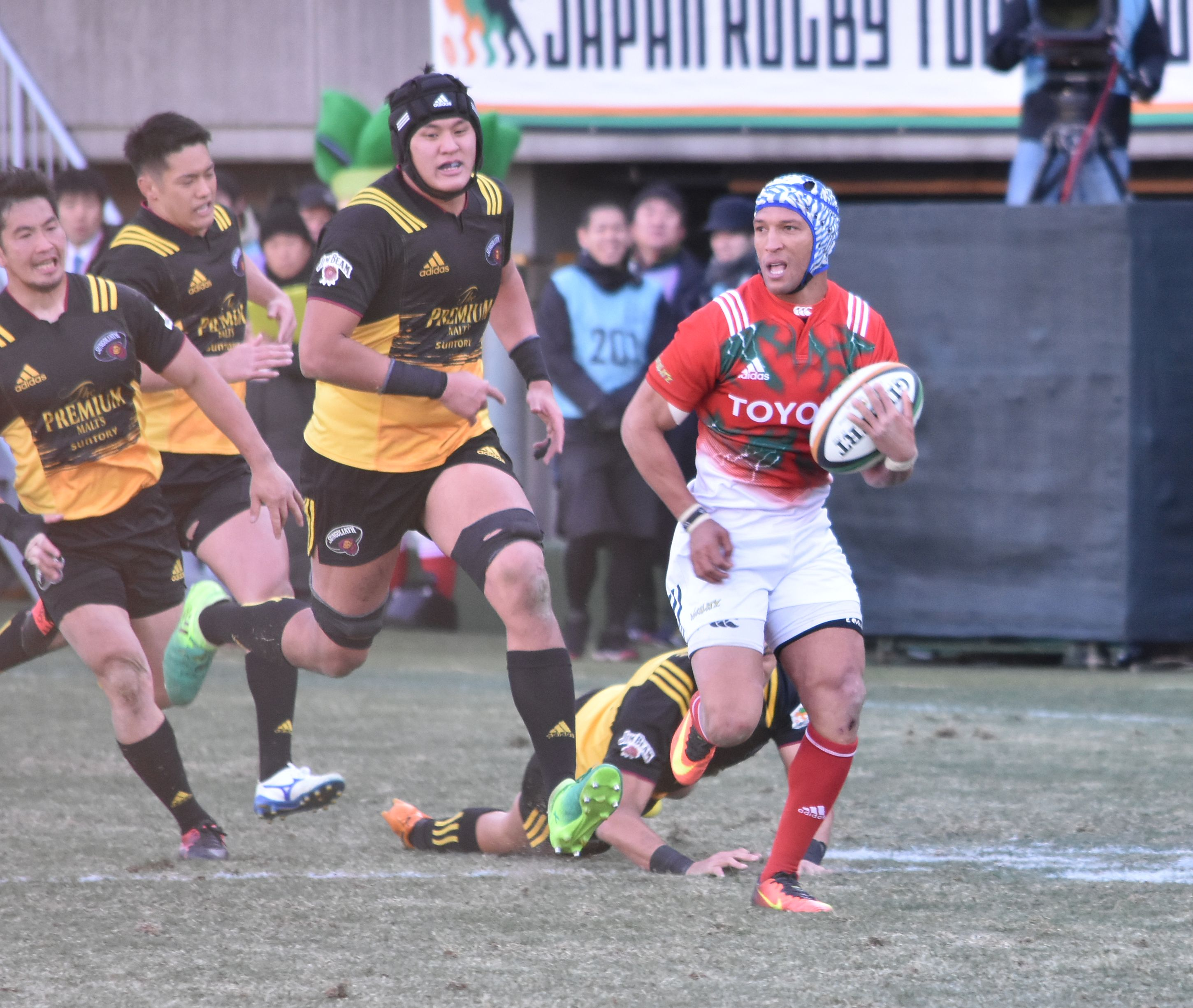 ジオ・アプロン